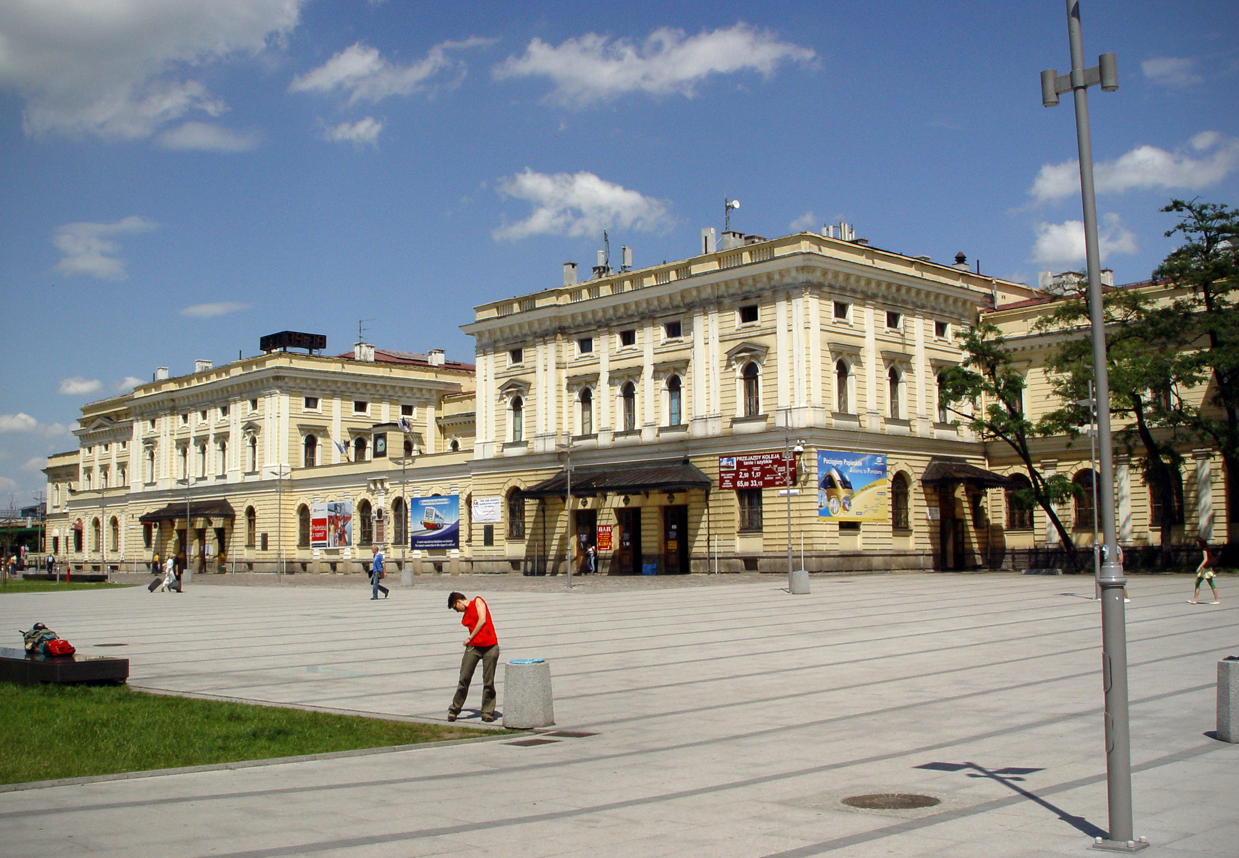 Kraków Główny Osobowy - Budynek Dworcowy